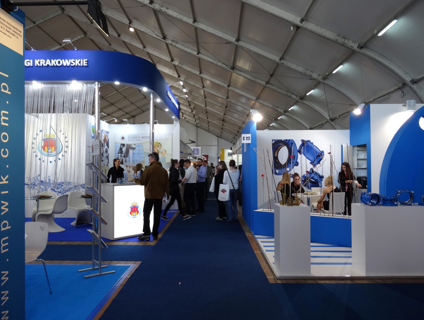 XXIII Międzynarodowe Targi Maszyn i Urządzeń dla Wodociągów i Kanalizacji WOD-KAN 2015 w Bydgoszczy